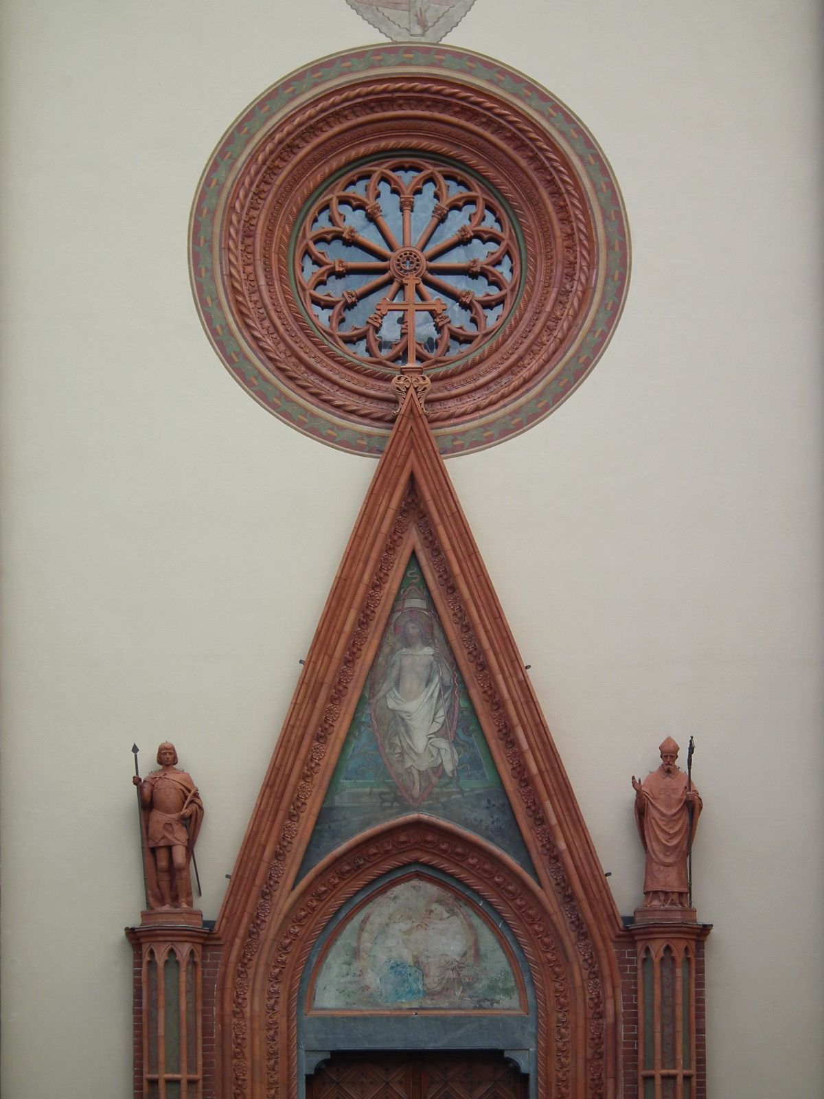 Pinerolo Cathedral San Donato Native nameDuomo di PineroloLocationPinerolo, ItalyCoordinates44° 53′ 08.49″ N, 7° 19′ 48.5″ E WebsiteParrocchia di San Donato nella Cattedrale